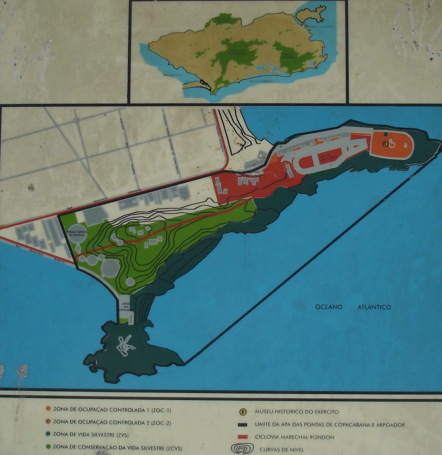 Map of Arpoador Park, Rio de Janeiro, Brazil